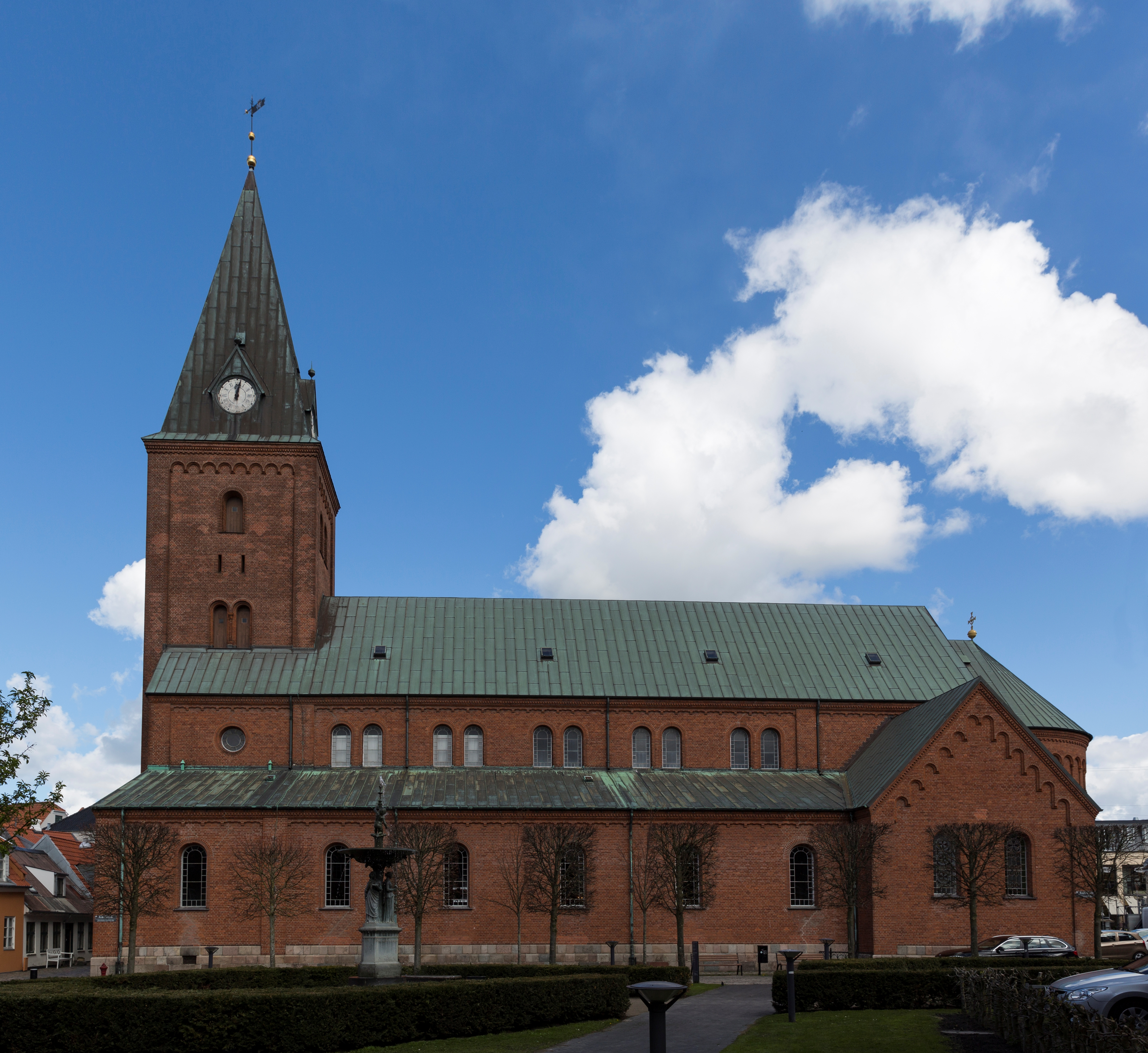 Vor Frue Kirke Aalborg ved middagstid 16. april 2017